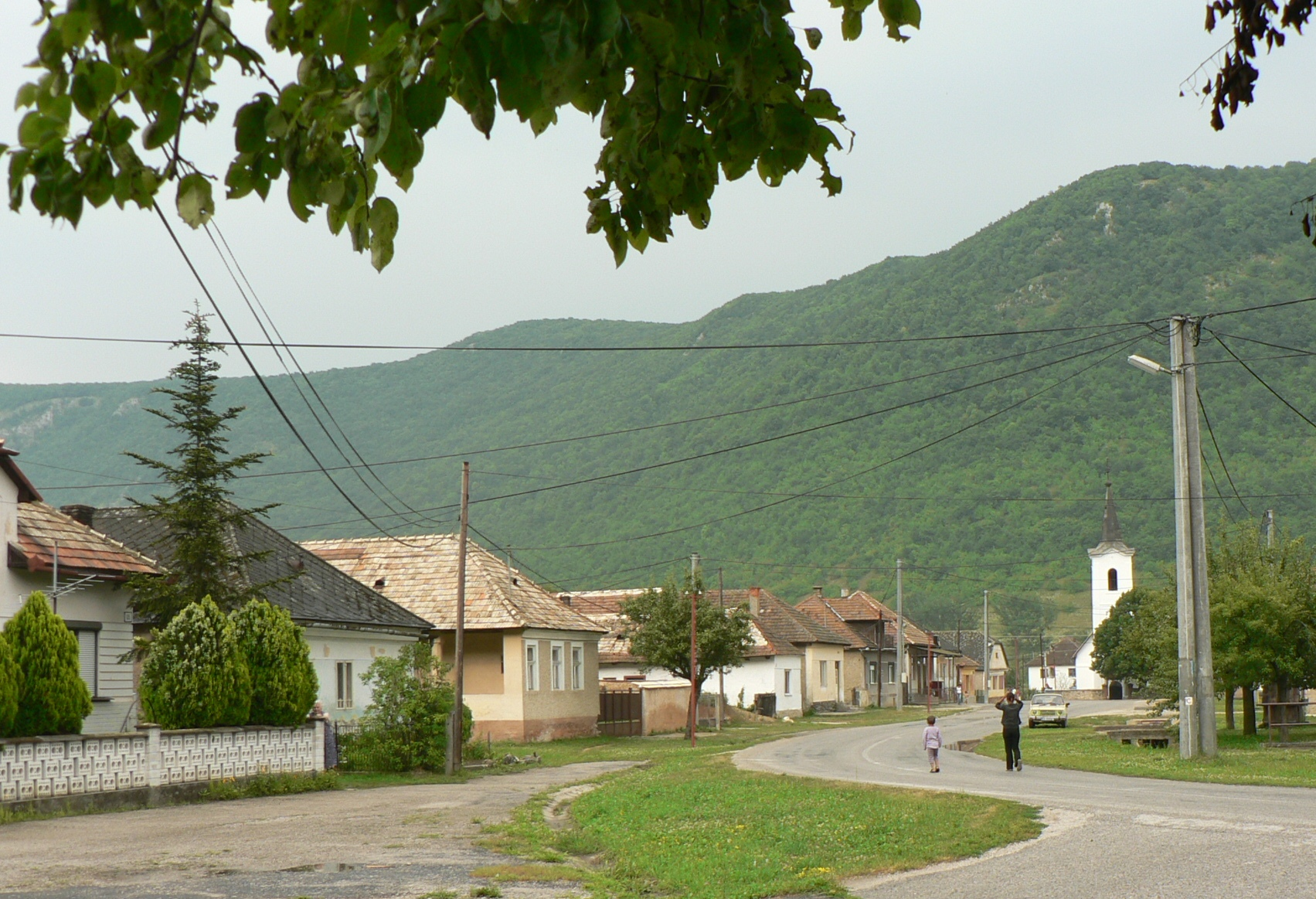 Páskaháza